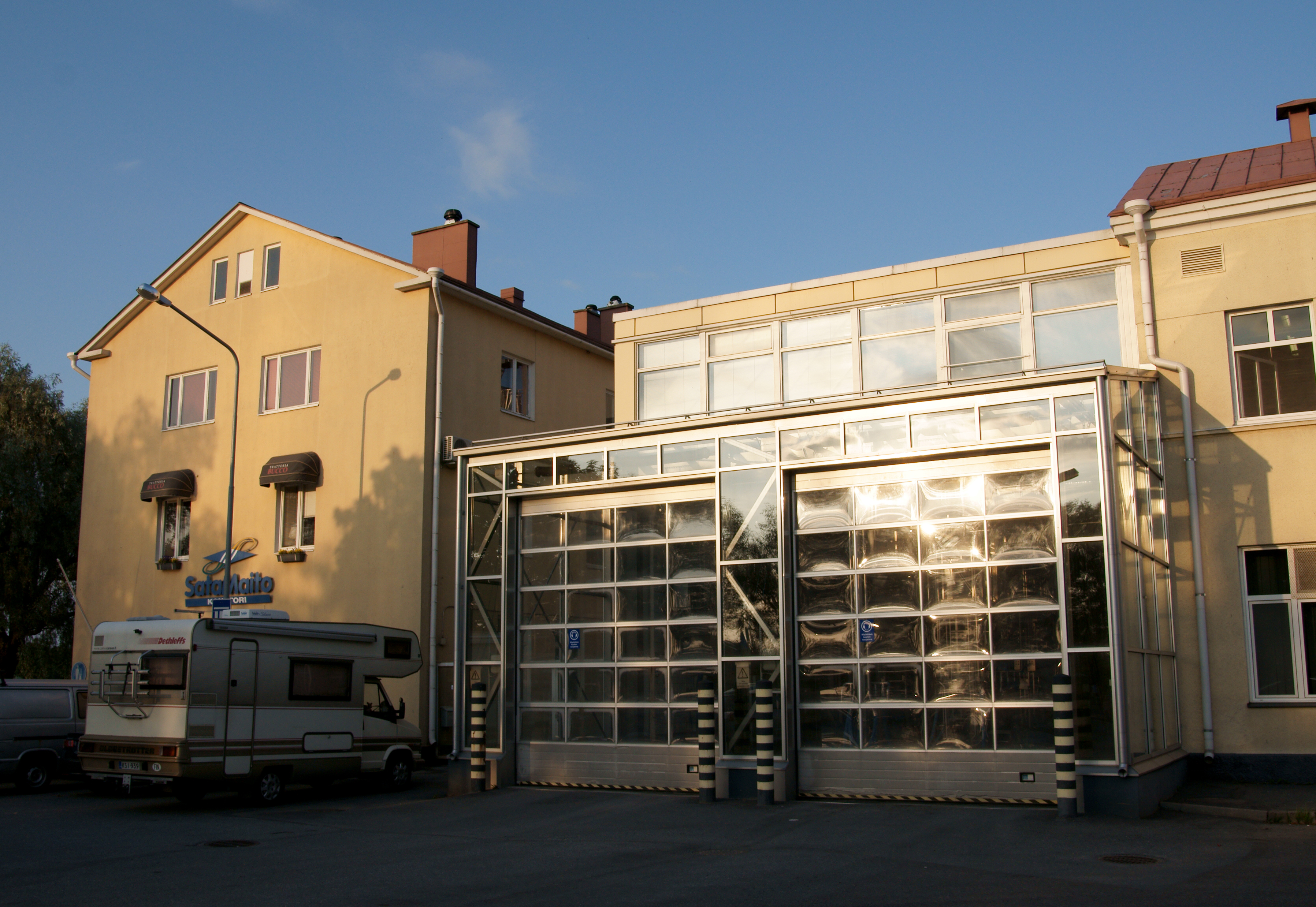 Satamaidon konttori Porissa.